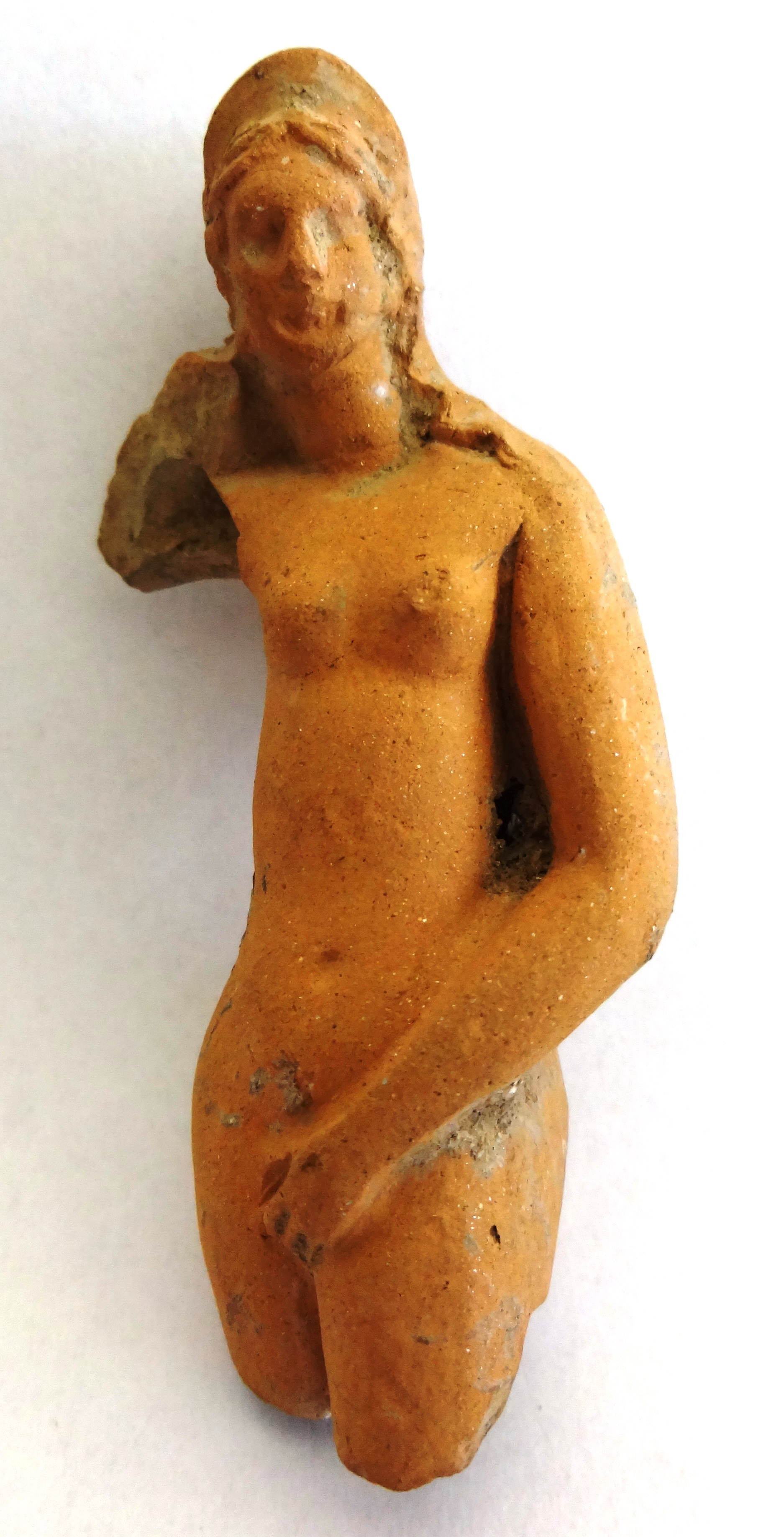 Venus aus Ton, römisch, ca. 1. bis 3. Jh. n. Chr., ca. 6,5 cm hoch